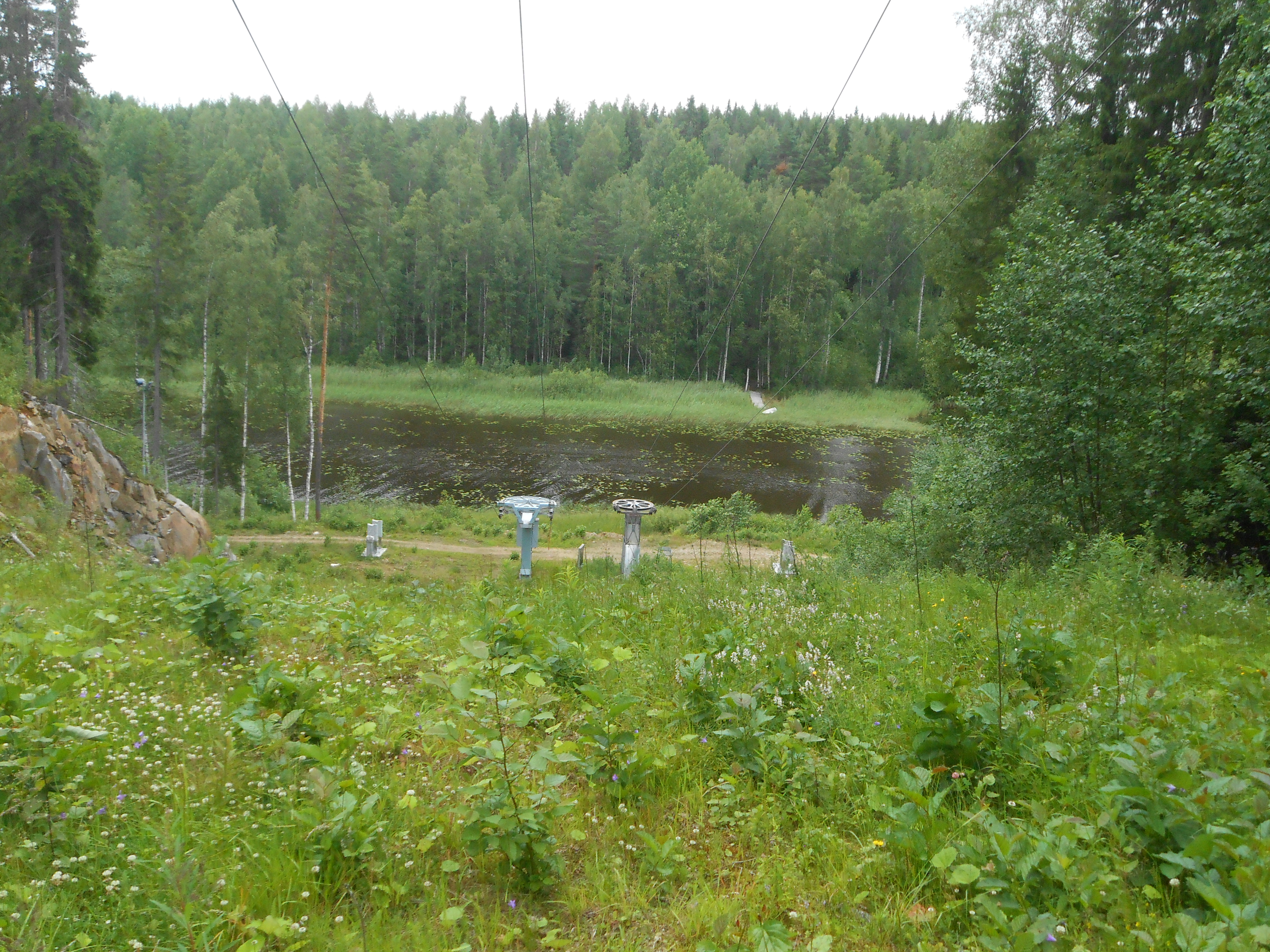 Sappeen hiihtokeskuksen hissejä kesällä 2016.